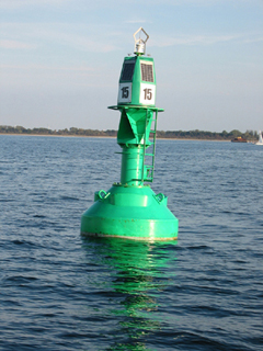 Tonne